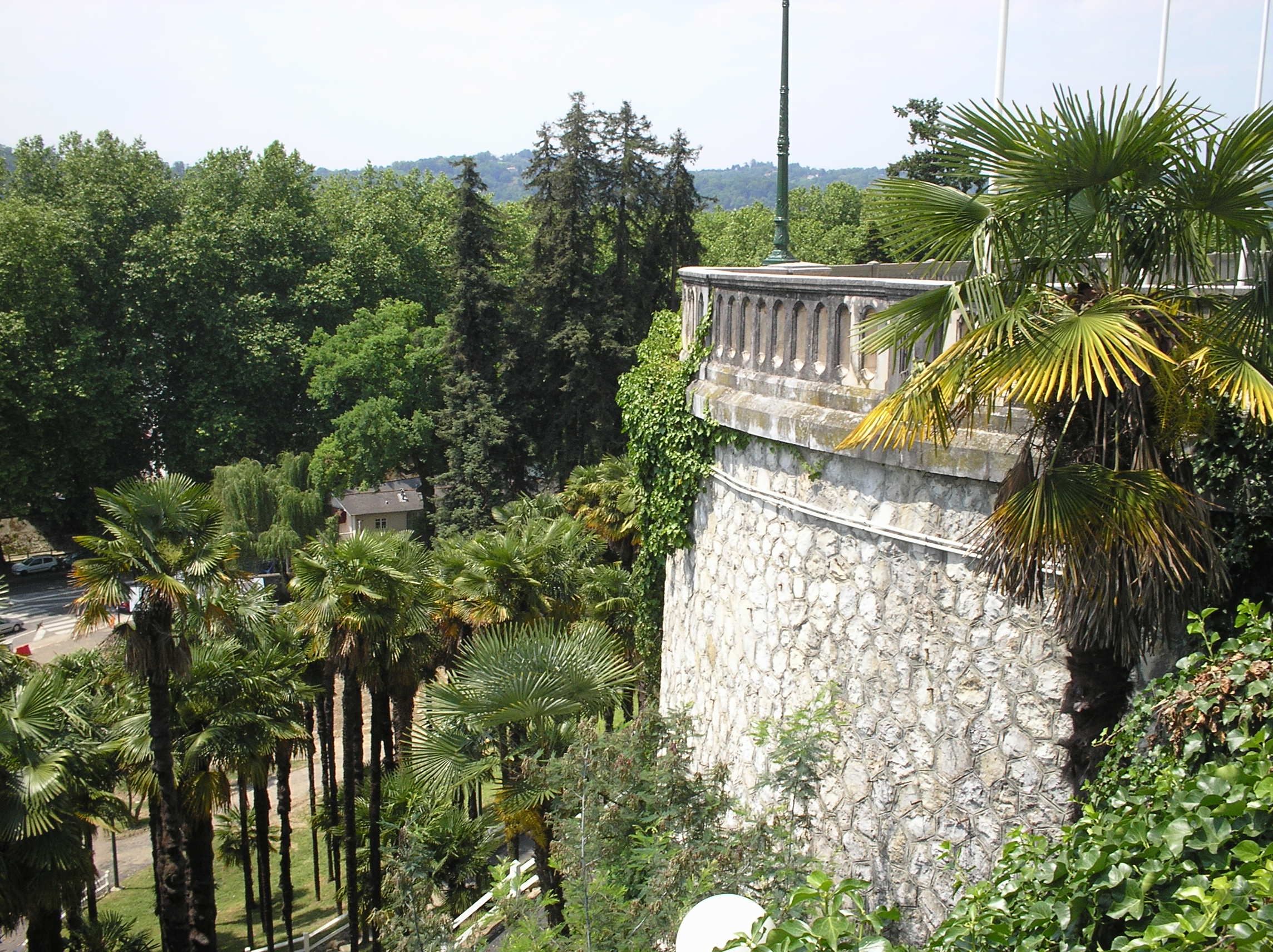 Détail sur le Boulevard des Pyrénées à Pau